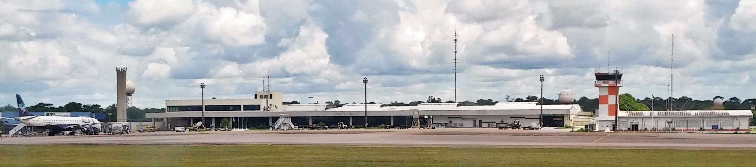 Aeroporto Internacional de Porto Velho